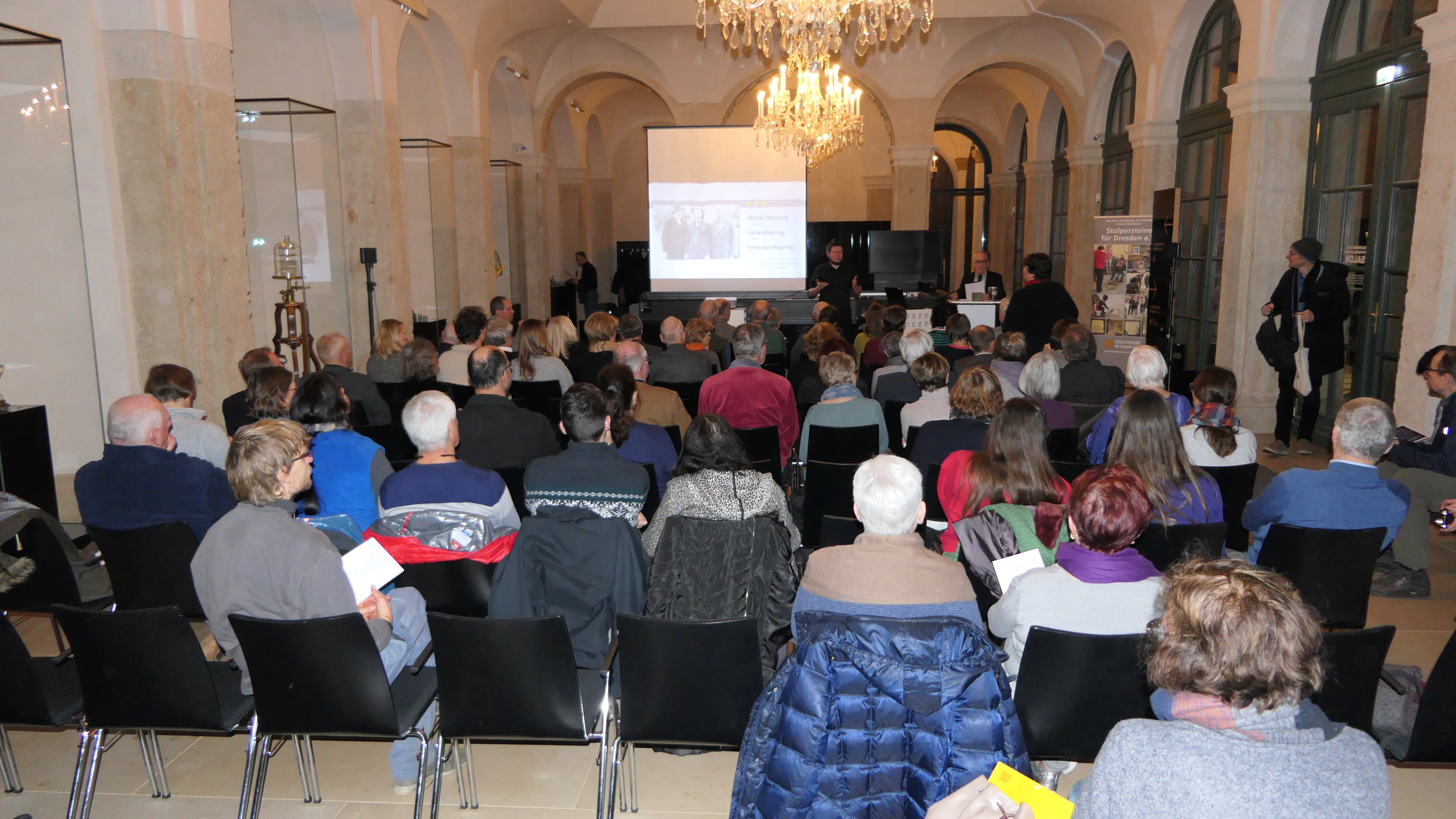 Gedenkveranstaltung anlässlich der Stolperstein-Verlegung im Mathematisch-Physikalischen Salon im Dresdner Zwinger am 2. Dezember 2019 (ehemaliger Grottensaal)